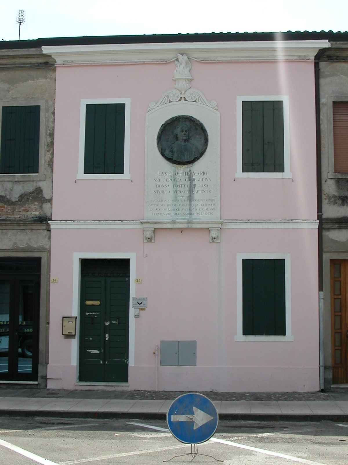 Abitazione con targa a Jessie White-Mario, Lendinara, Provincia di Rovigo.